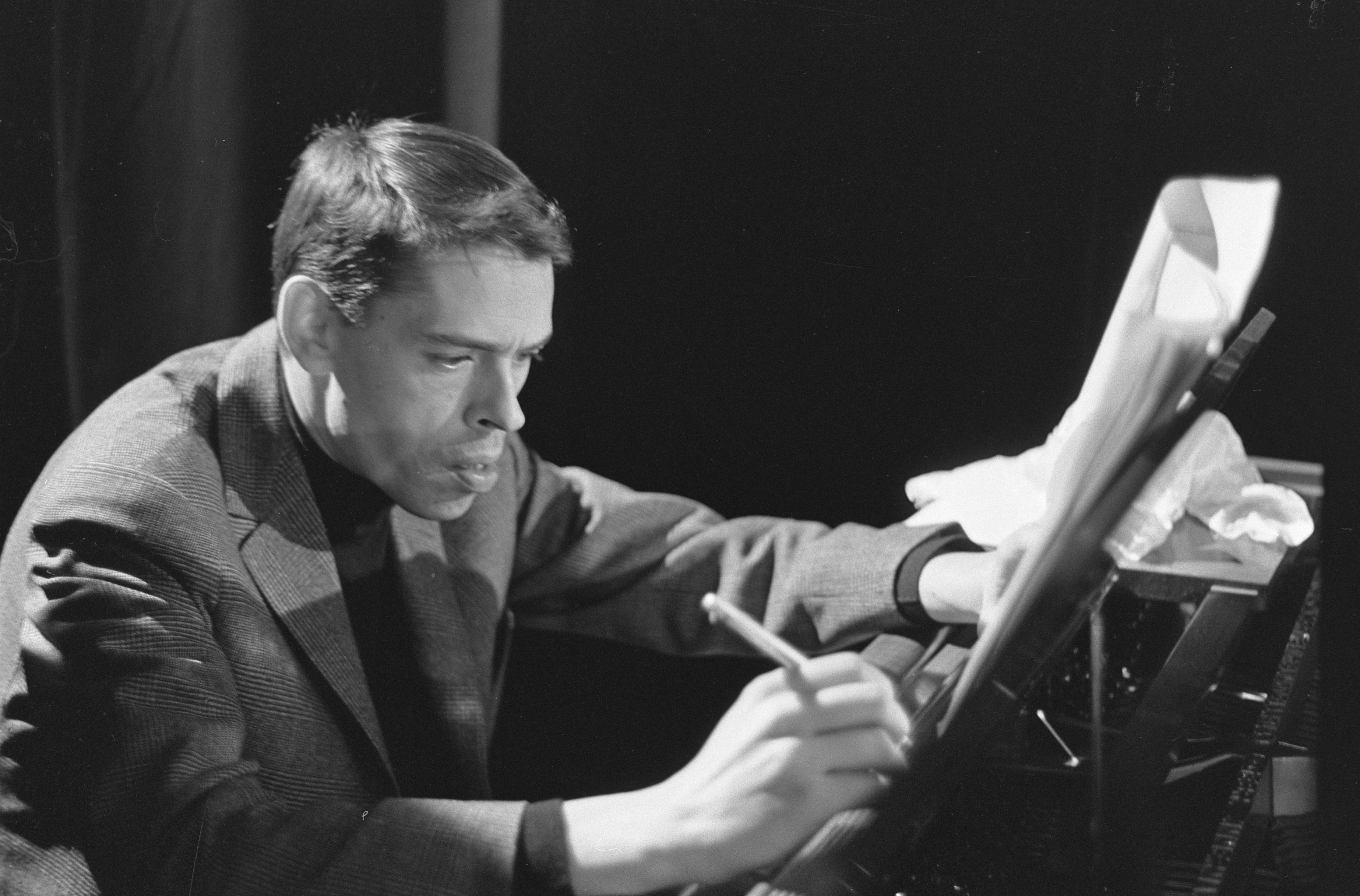 Collectie / Archief : Fotocollectie Anefo Reportage / Serie : [ onbekend ] Beschrijving : TV-uitzending "Domino" Jacques Brel tijdens de opname in Amsterdam, Marcanti Datum : 20 februari 1963 Locatie : Amsterdam, Noord-Holland Trefwoorden : TV-programma's, zangers Persoonsnaam : Brel, Jacques Fotograaf : Bilsen, Joop van / Anefo Auteursrechthebbende : Nationaal Archief Materiaalsoort : Negatief (zwart/wit) Nummer archiefinventaris : bekijk toegang 2.24.01.05 Bestanddeelnummer : 914-8399